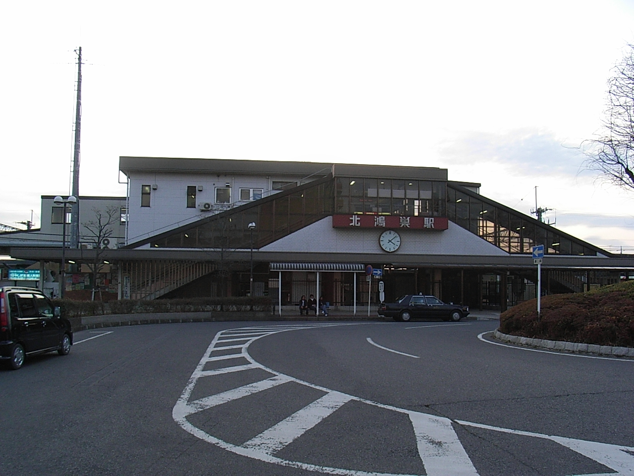 Kita-Konosu Station on JR Takasaki Line. (1-1,Akamidai,Konosu-shi,Saitama-ken,JAPAN)